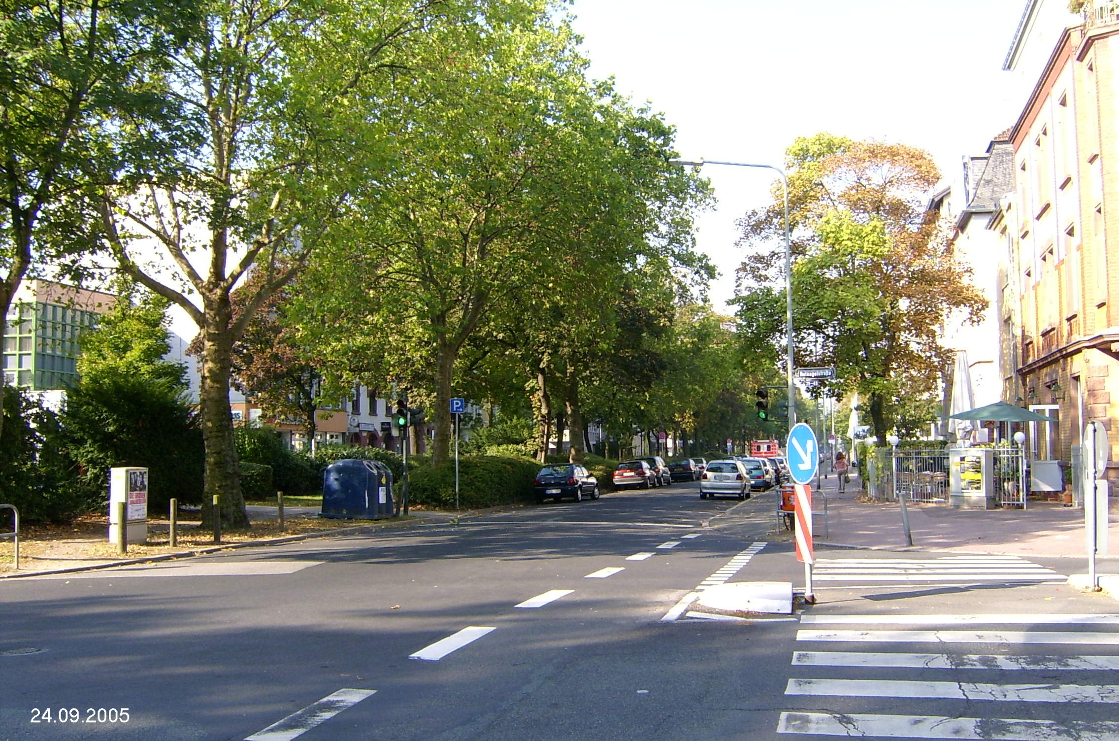 Die Frankenallee in Frankfurt am Main (Gallusviertel), Höhe Hufnagelstraße, Blickrichtung Westen